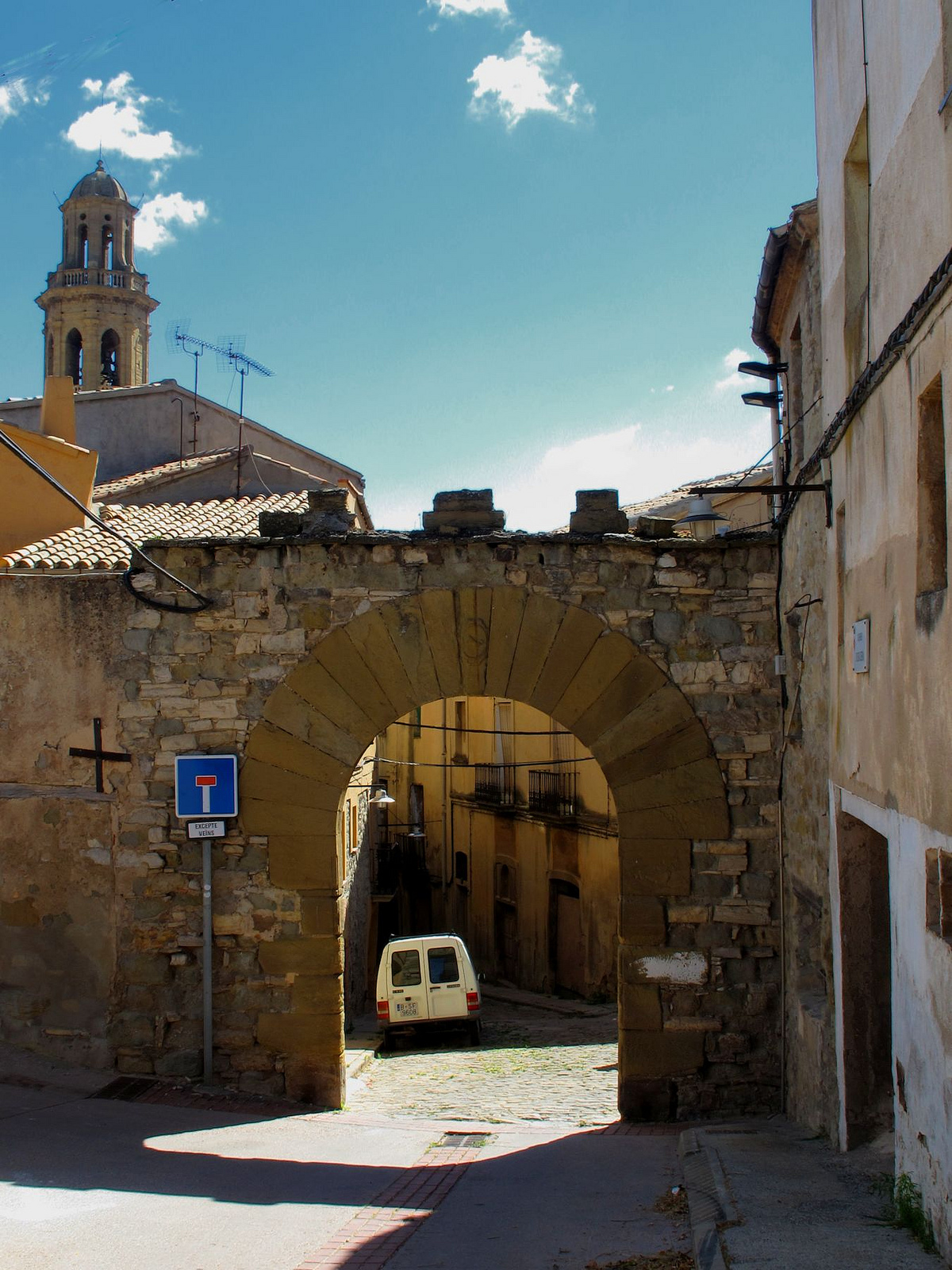 Portals, un sector de muralla i una torre quadrada de l'Hospital (Calaf)